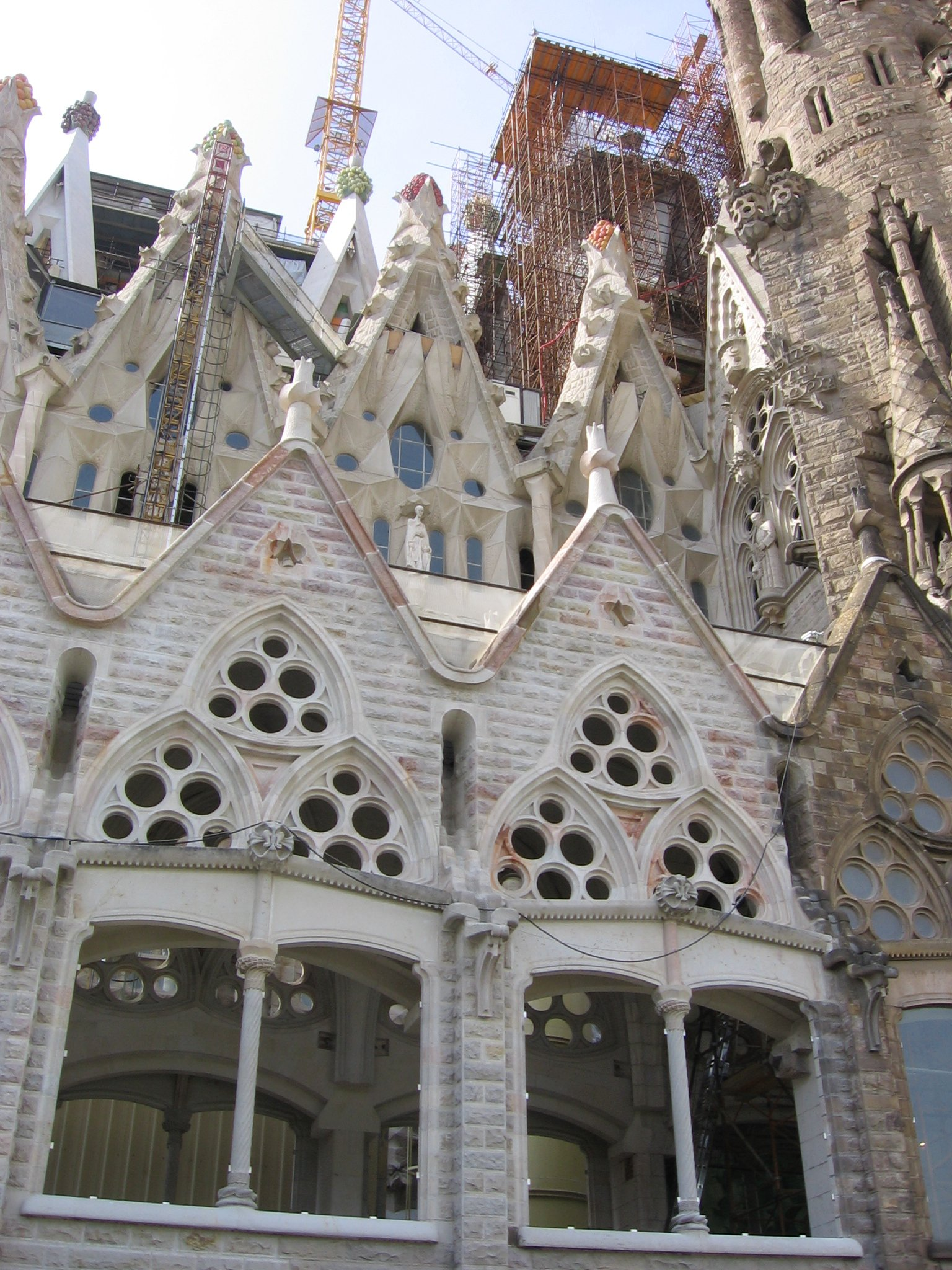 Sagrada Familia - Claustro